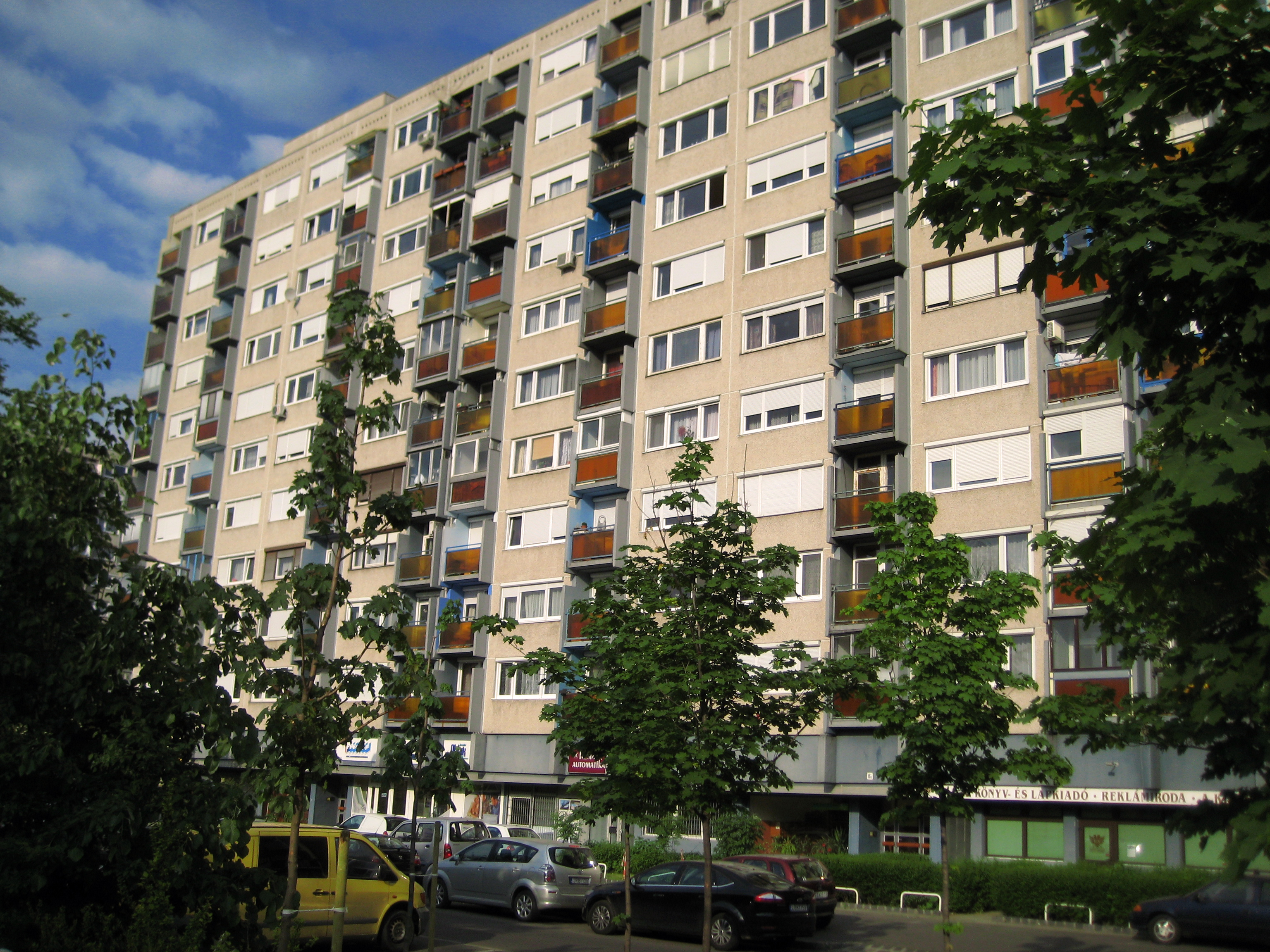 Kommunista tömbházak Budapest XIII. kerületében